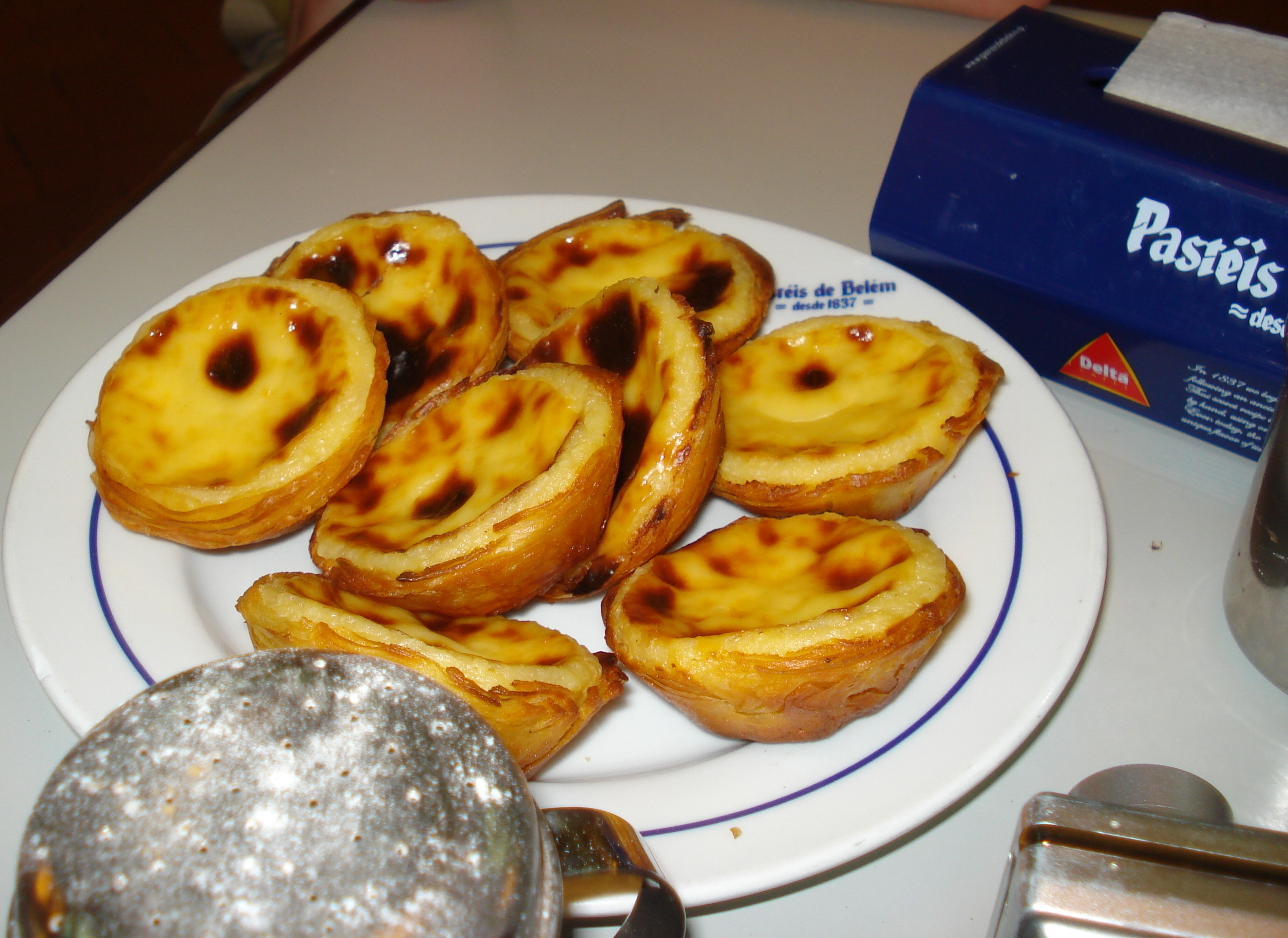 Pastéis de Belém na Pastelaria de Belém, Lisboa, Portugal